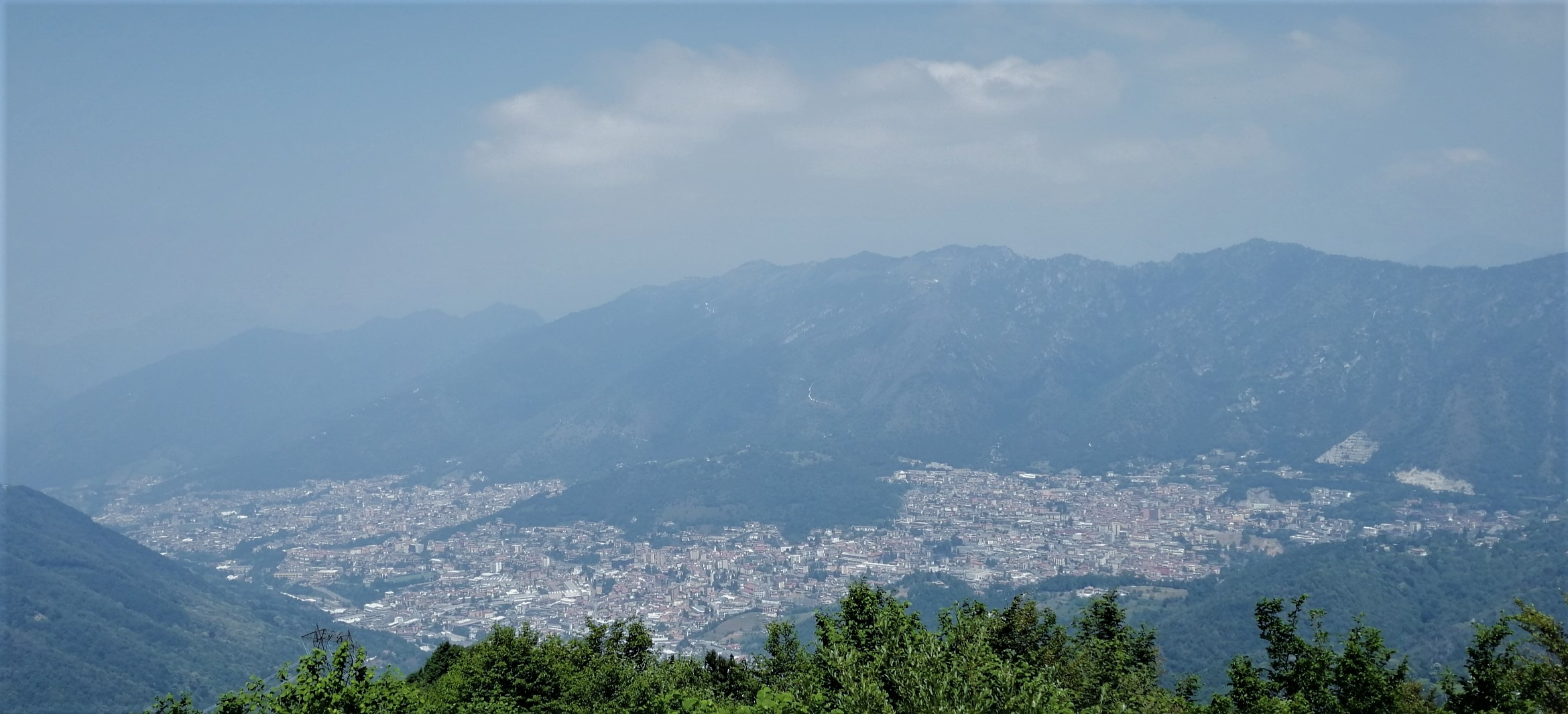 Lumezzane vista da Conche